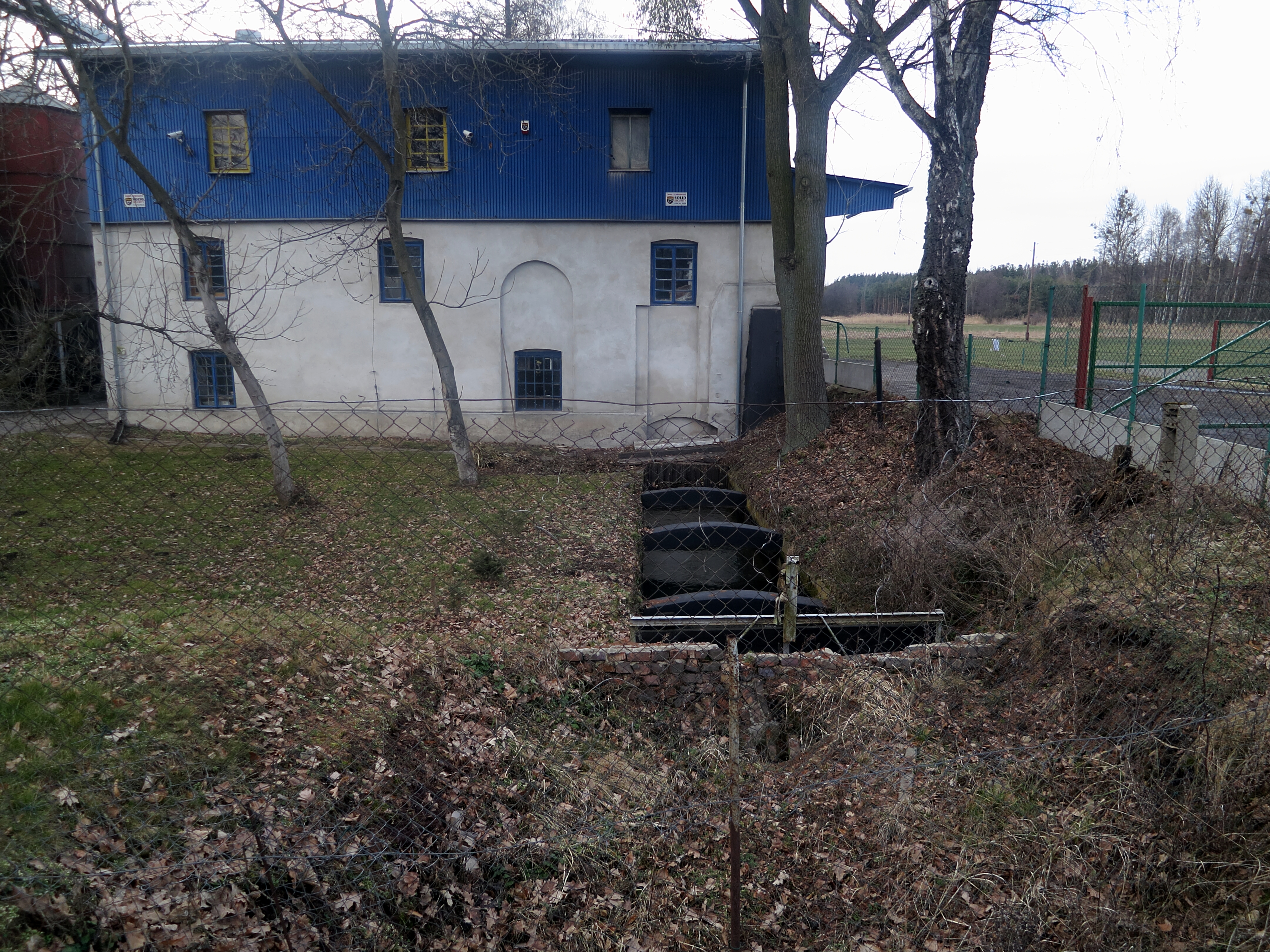 Kuźnica Stara, kuźnica, ob. młyn, XVIII/XIX, XX